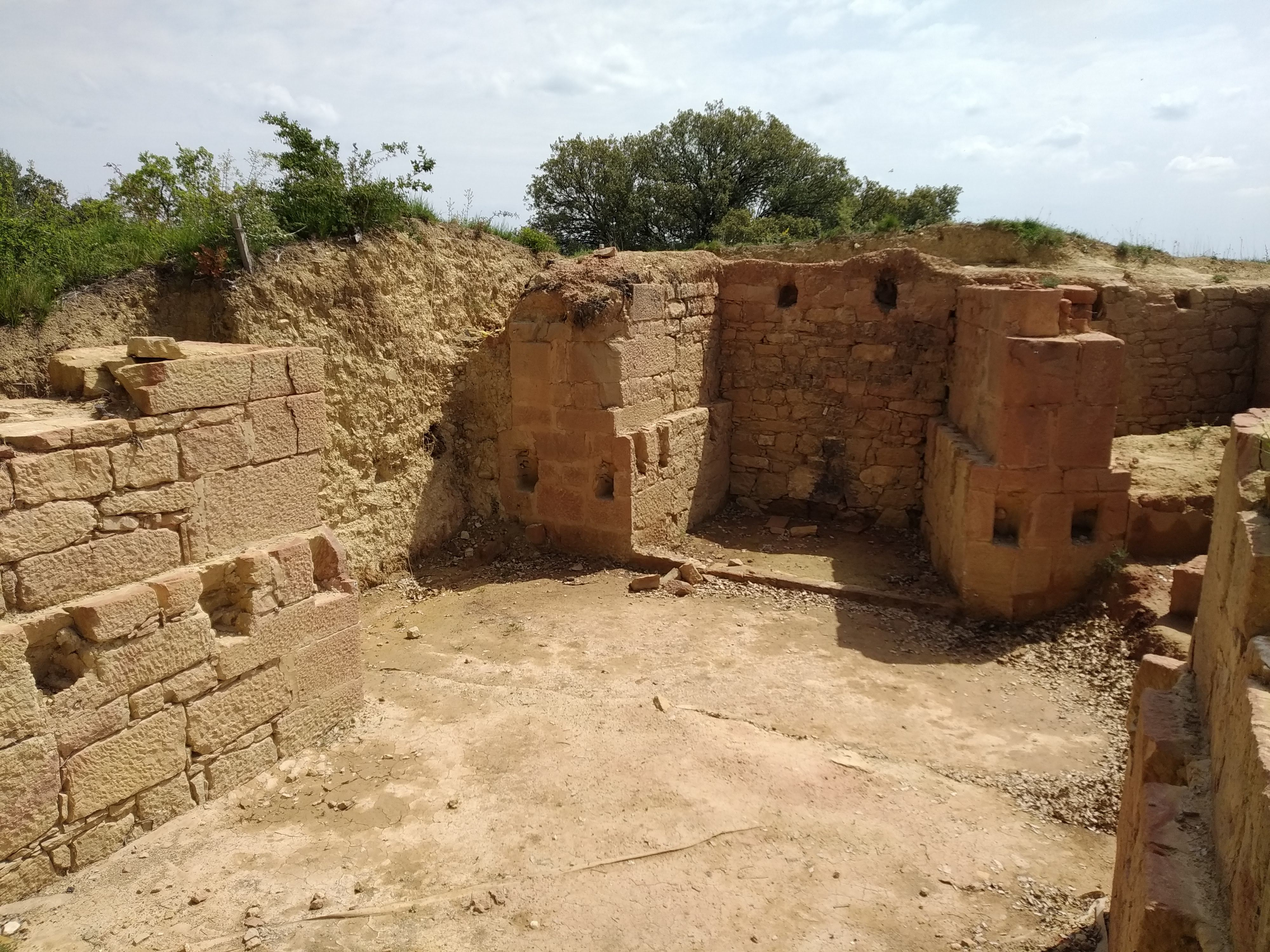 Fuerte construido por los carlistas al final de la 3ª Guerra Carlista para defender Estella con artillería, y enfrentarse a la artillería liberal que había en los altos de Villatuerta y Lácar.